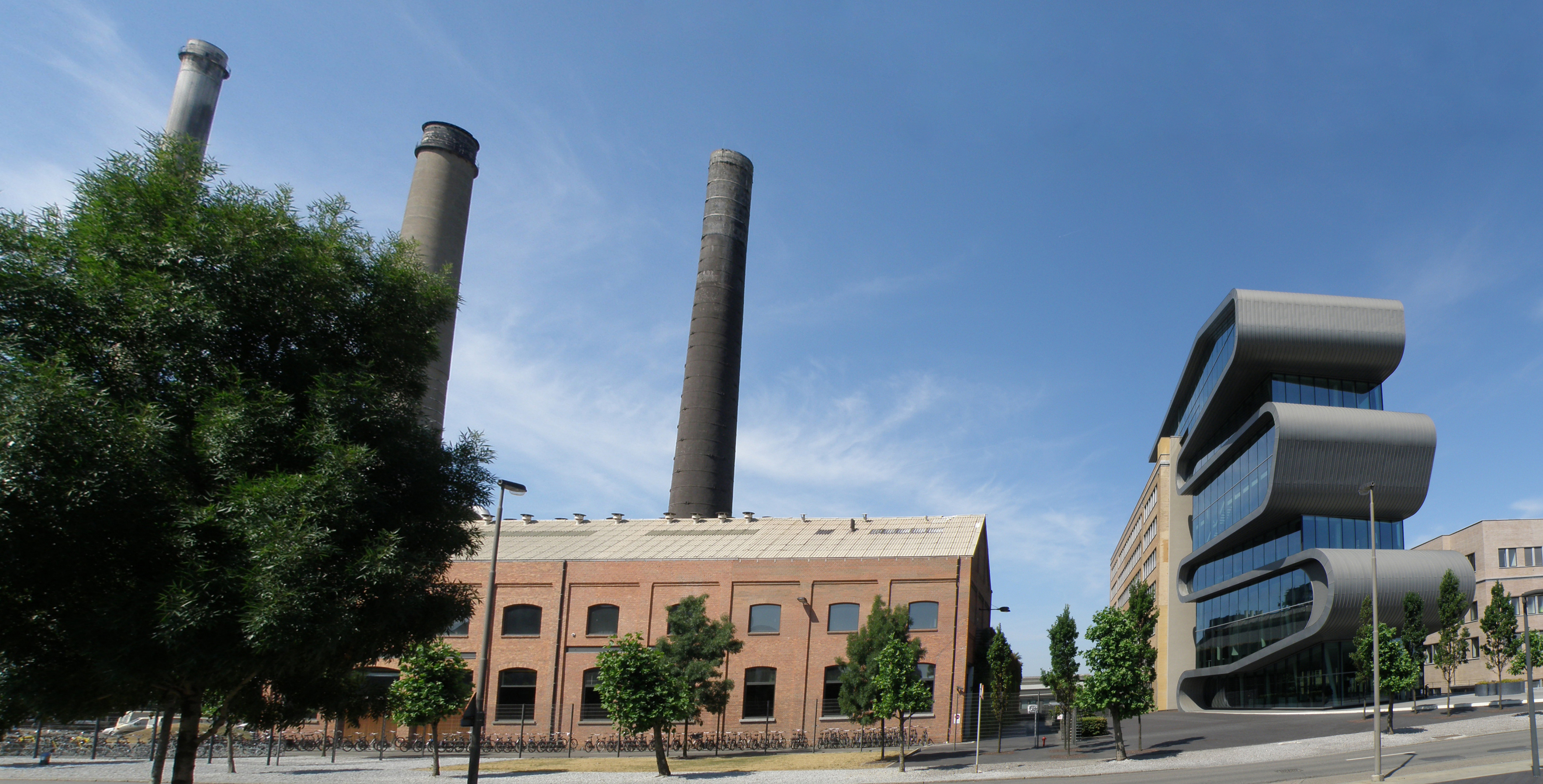 Antwerpen, district Hoboken (België). Umicore-fabrieken, Adolf Greinerstraat.